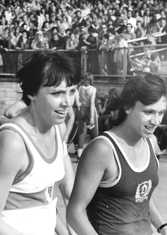 Bärbel Eckert, Romy Schneider ADN-ZB Kluge 3.7.77 Dresden: DDR-Leichtathletik-Meisterschaften-3.Tag-200-m-Olympiasiegerin Bärbel Eckert (SC Motor Jena,i.) gewann den DDR-Meistertitel auf ihrer Spezialstrecke mit 22,66 s. Der dritte Platz ging an die Berliner Dynamo-Läuferin Romy Schneider (r.) .